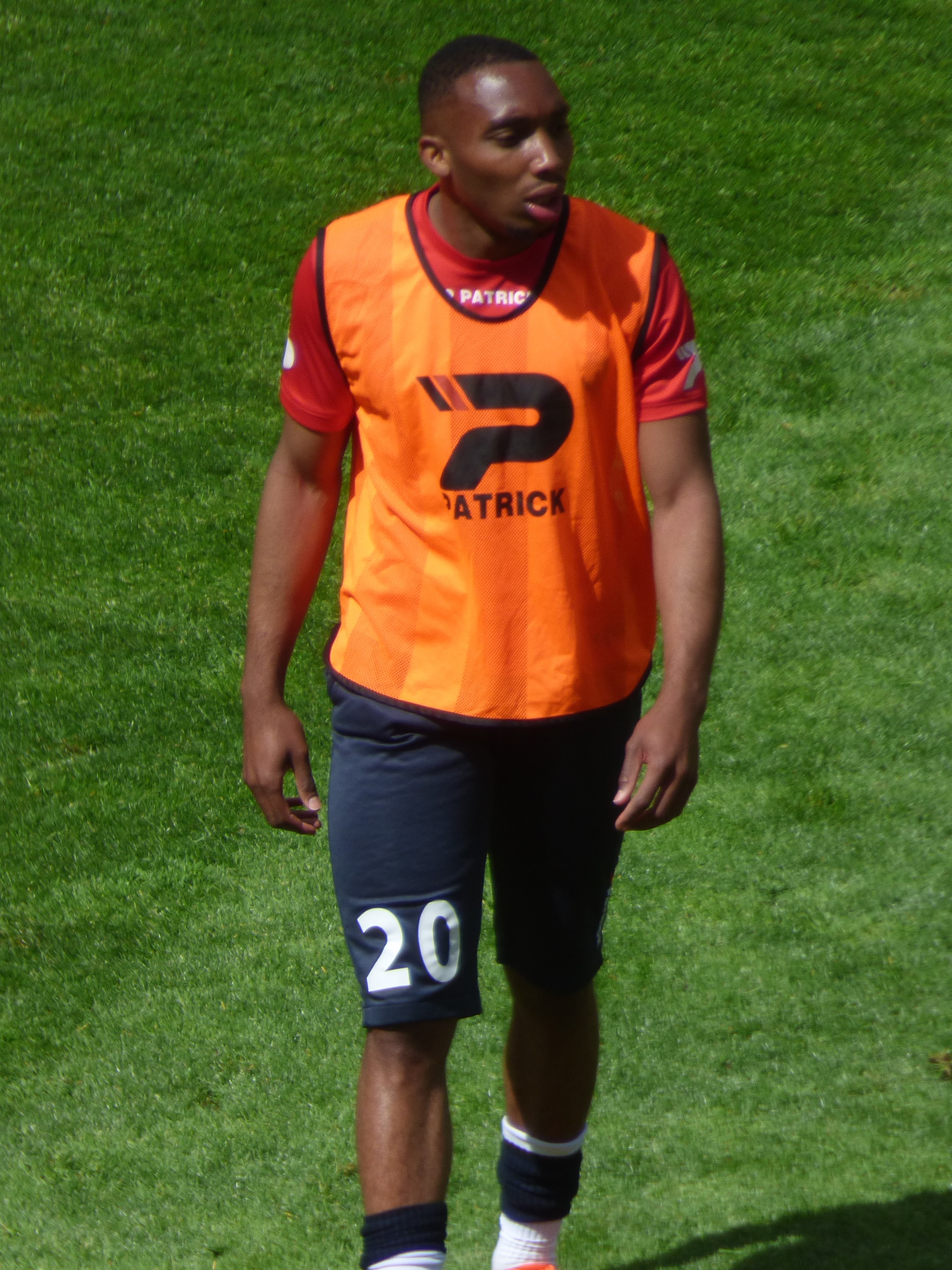 Ludovic Soares avant le match RC Lens / Clermont Foot 63, comptant pour la 36ème journée du championnat de France de football de Ligue 2 2018-2019, le 4 mai 2019, au stade Bollaert-Delelis.